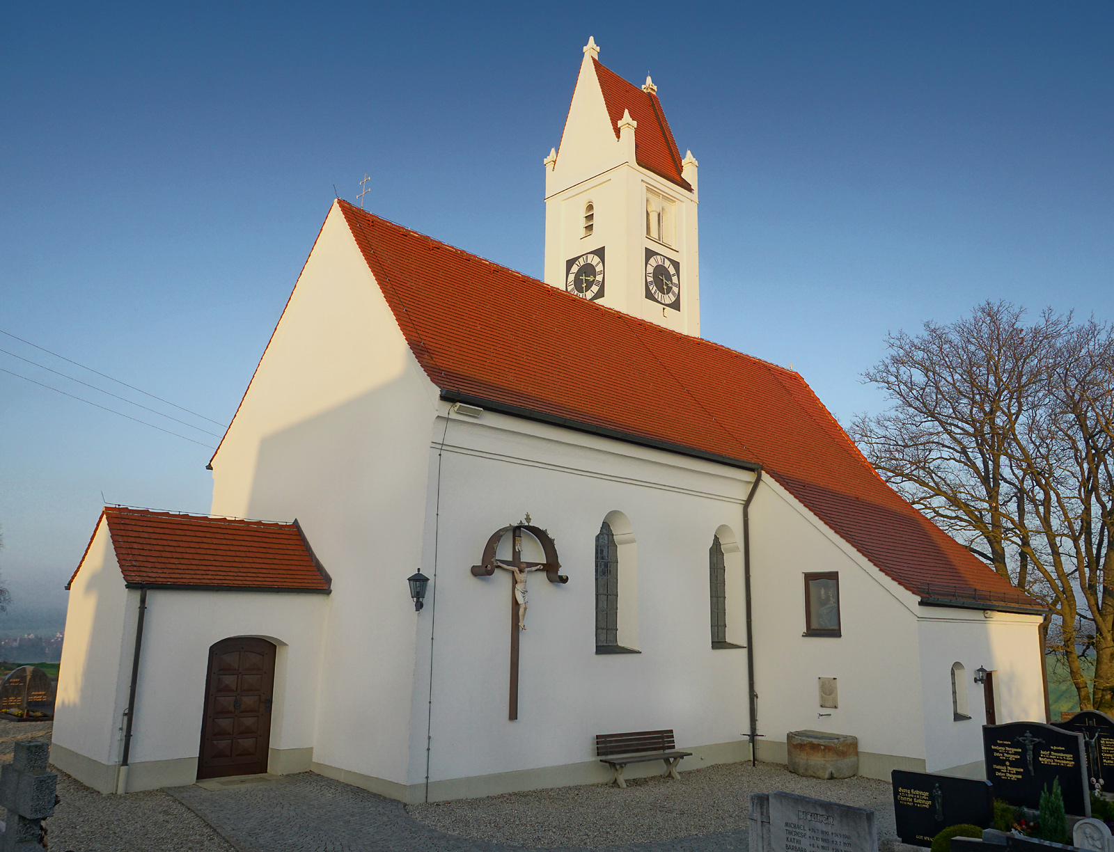 Welshofen Kirche